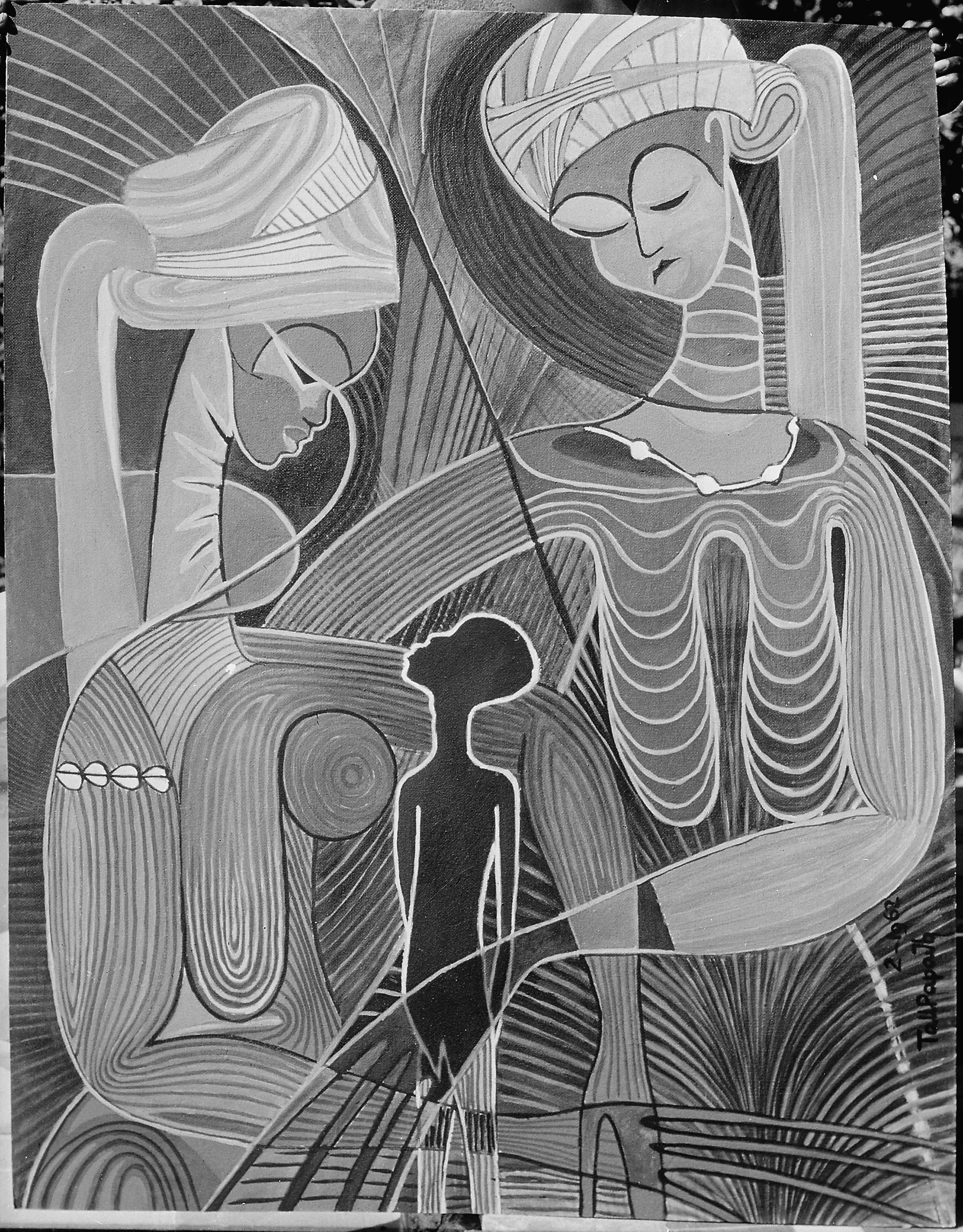 General notes: Oil